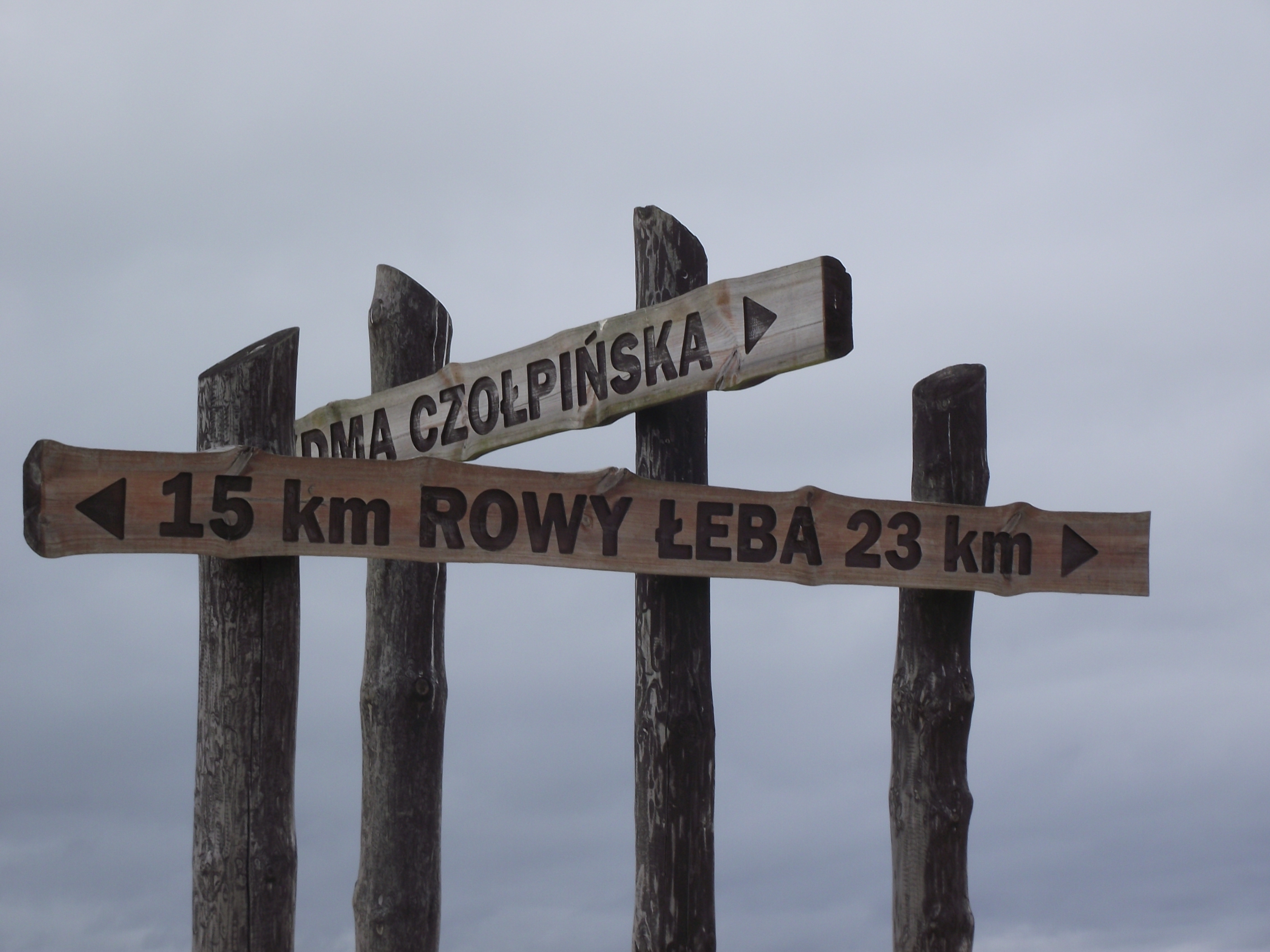 Zdjęcie drogowskazu na wydmie czołpińskiej.